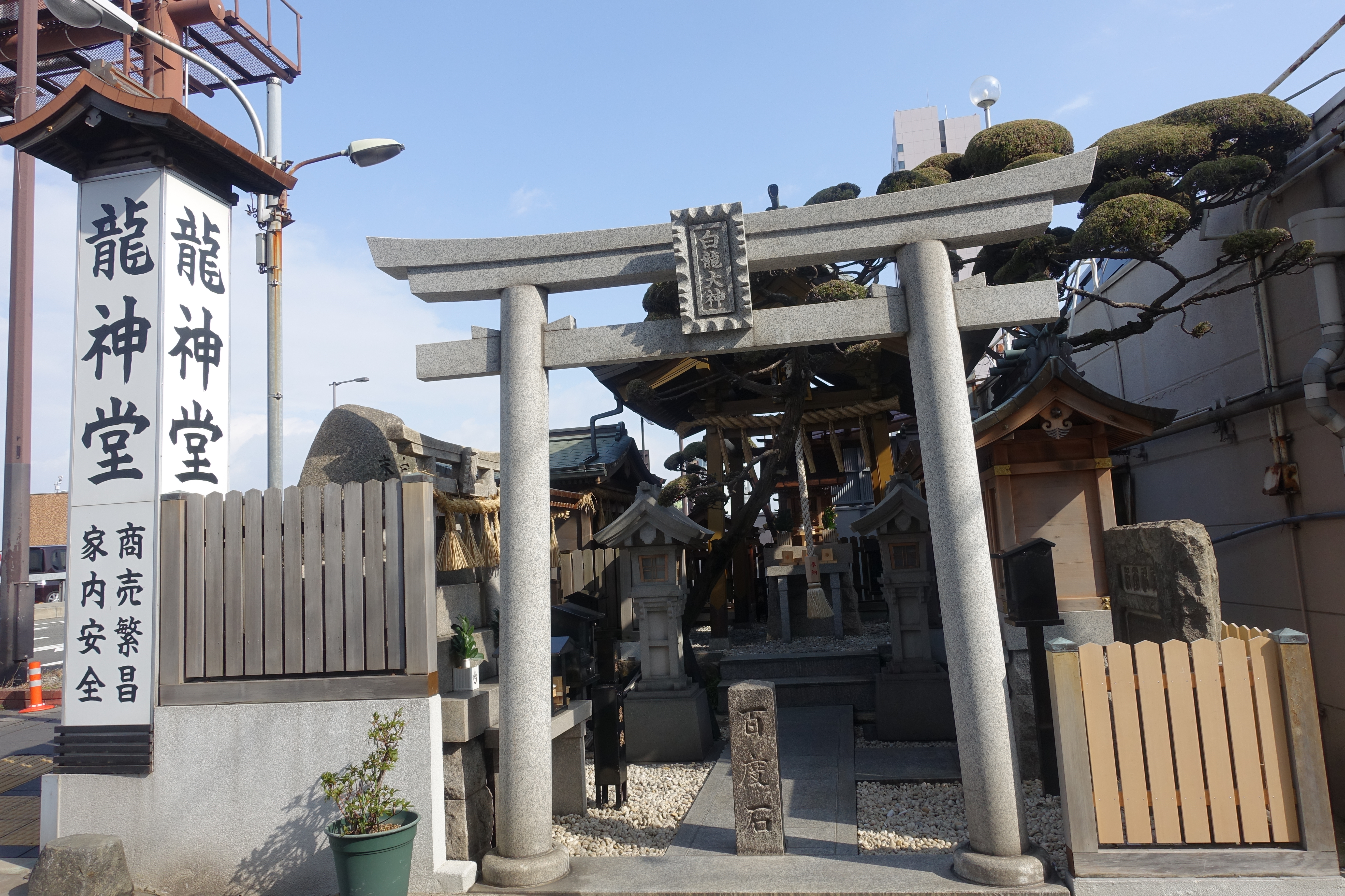 龍神堂の全景